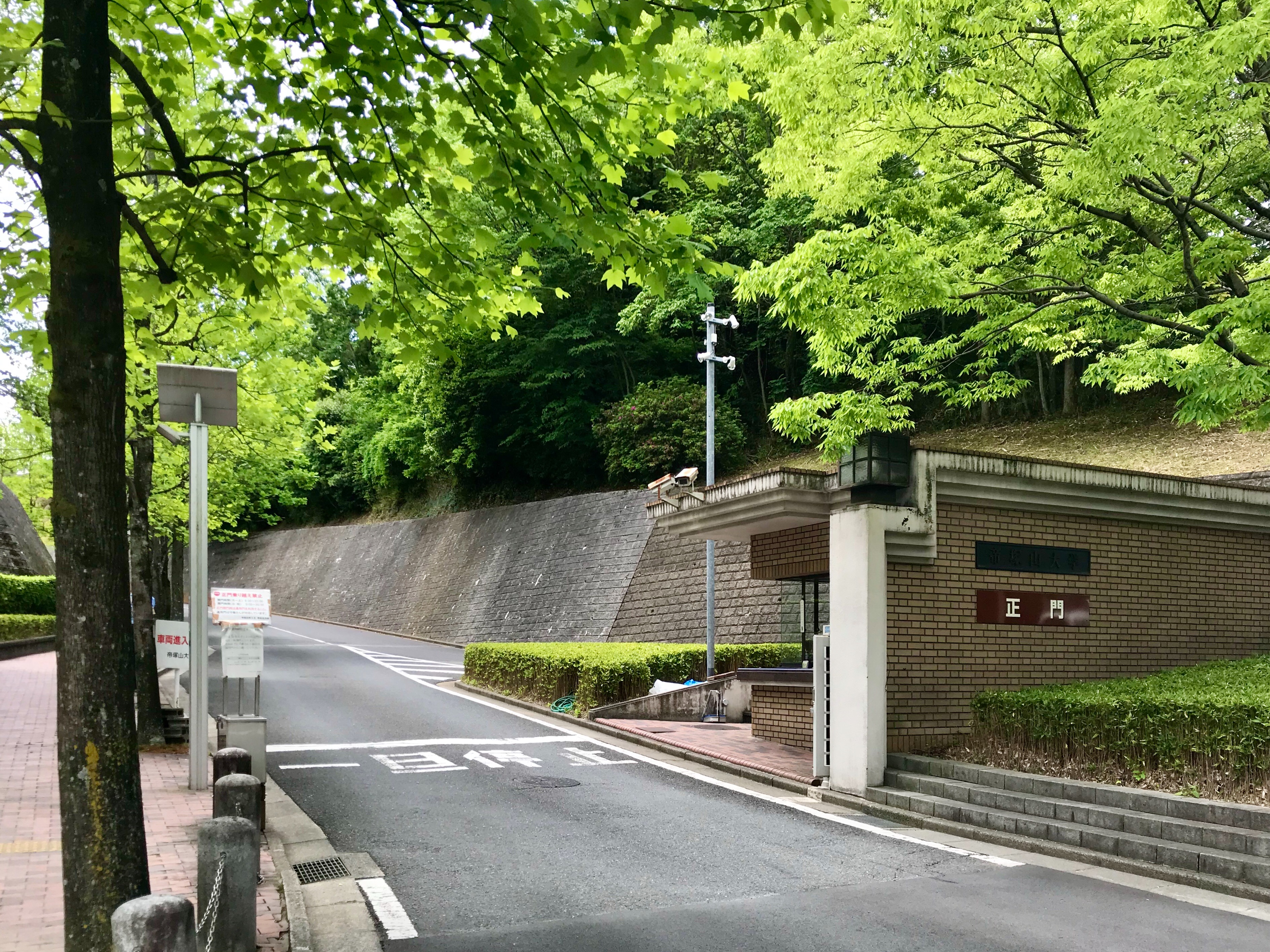 帝塚山大学奈良・東生駒キャンパス